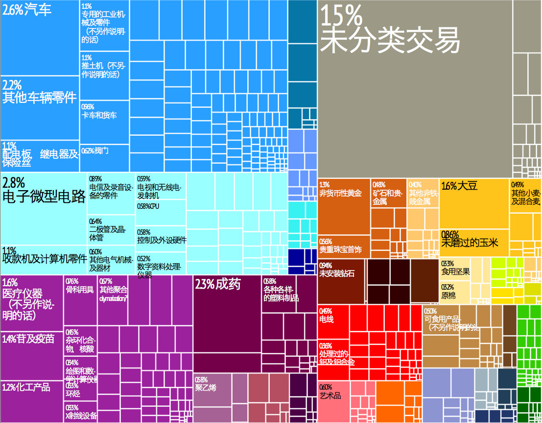 以28种颜色分类描述此国的产品出口，每种颜色盒代表一类产品，其大小代表此产品在此国总出口产品中的比重。